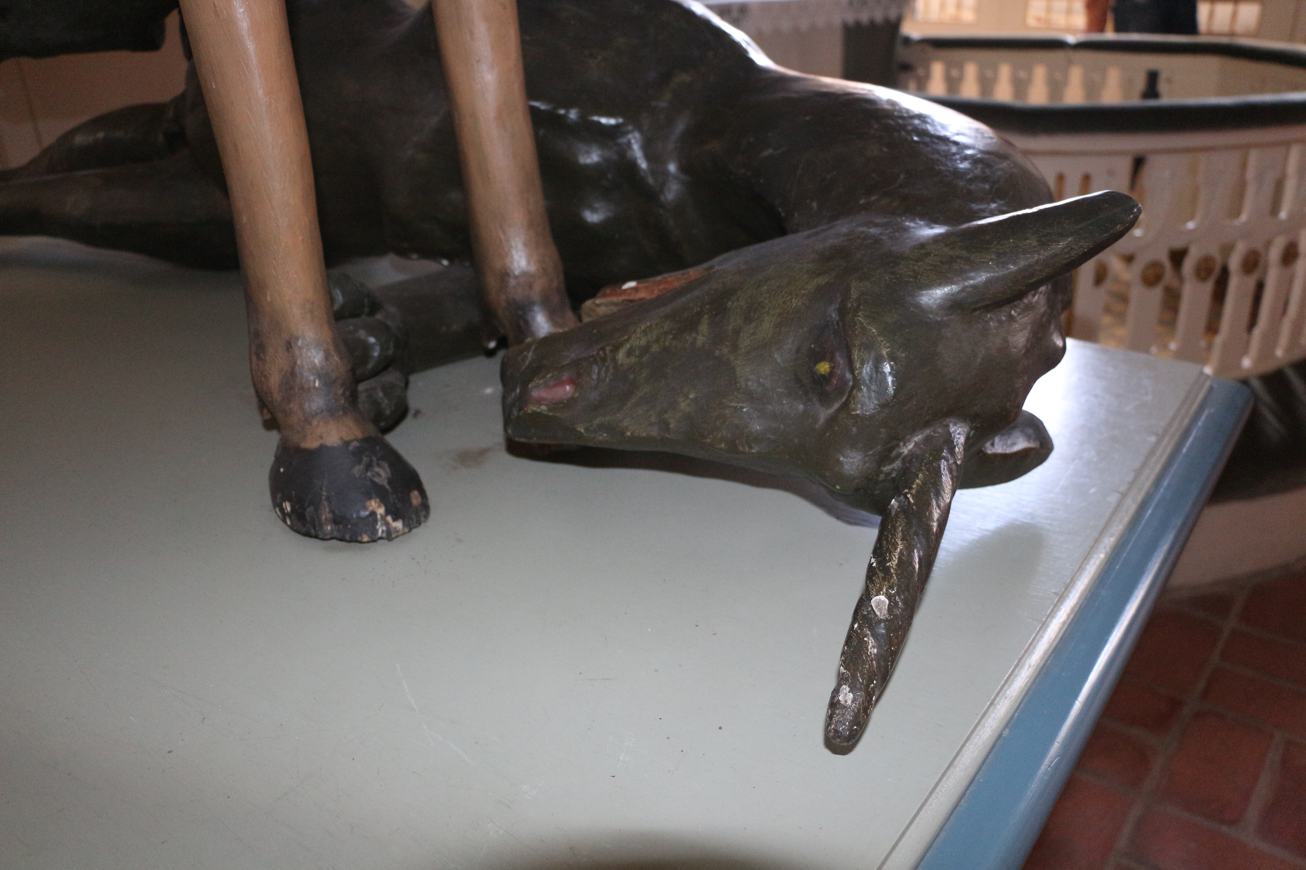 Kopf des Drachen der St.-Georg-Gruppe in der St.-Wilhadi-Kirche in Ulsnis